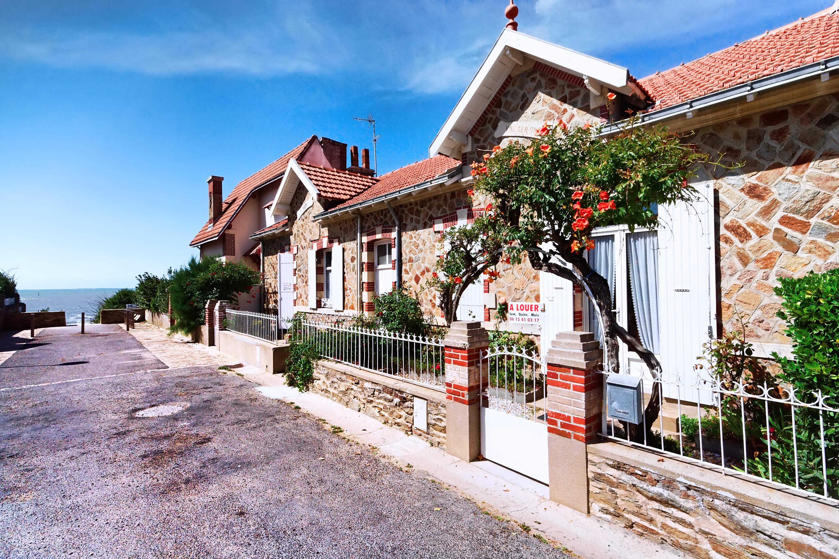 la bernerie-en-retz